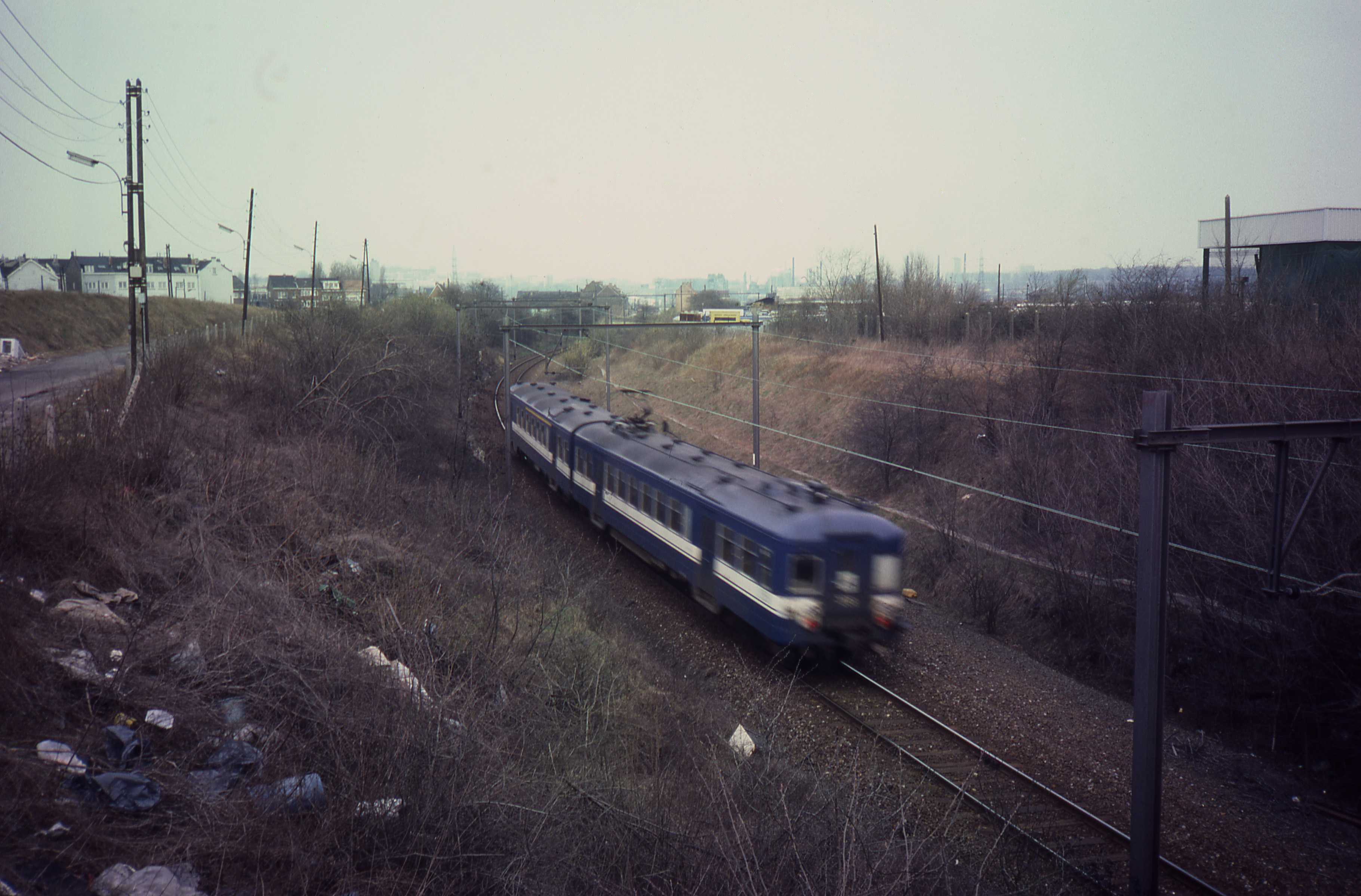 Sabenatrein in 1986 op spoorlijn 36/1, een route alleen gebruikt bij omleidingen.